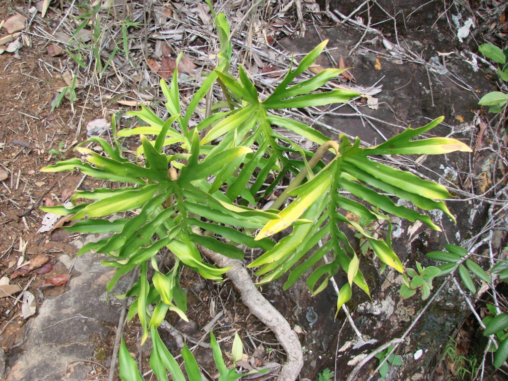 Philodendron mayoi E.G.Gonç. - ARACEAE - Chapada Imperial - Brasília - Distrito Federal - Brasil.